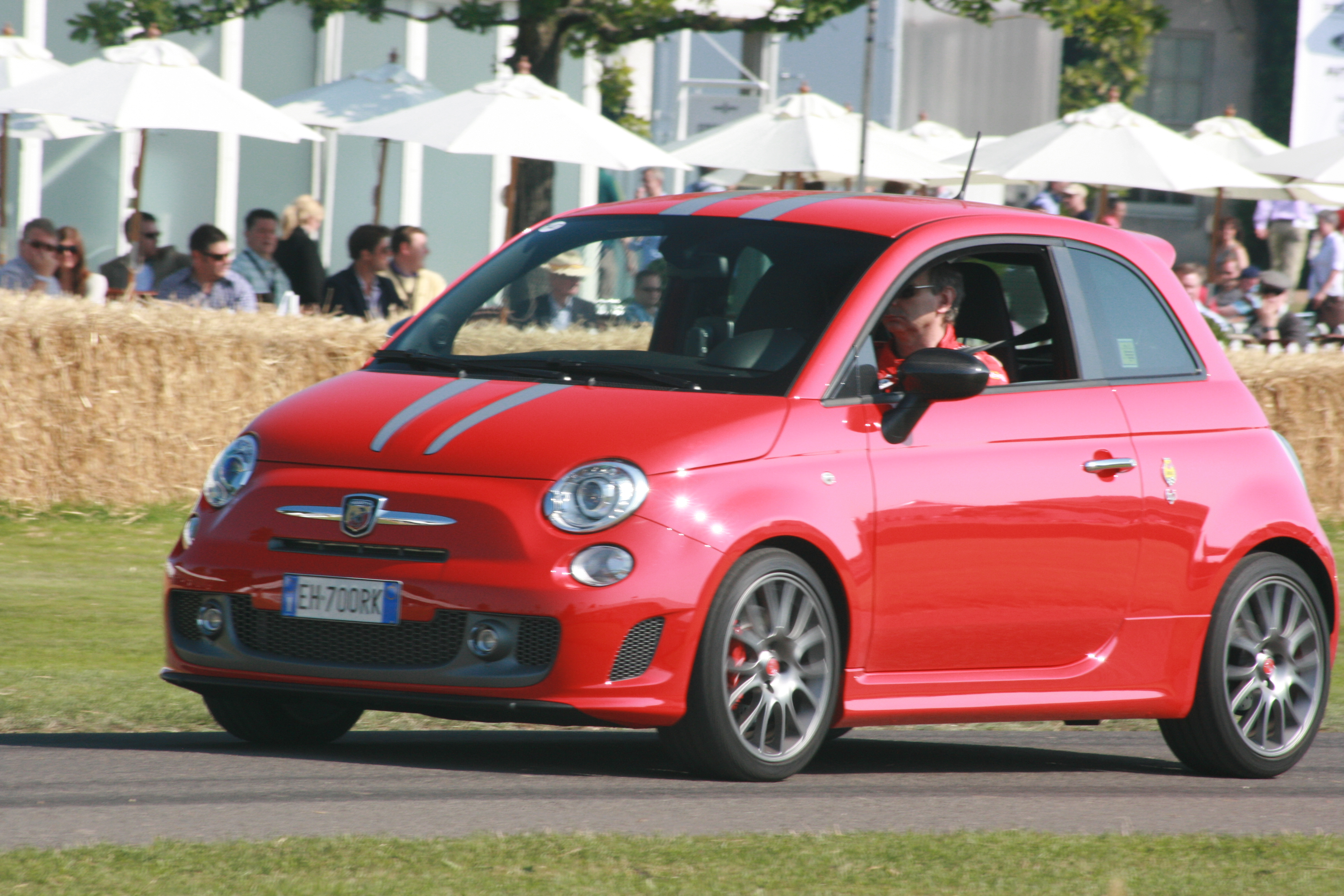 Fiat 500 Tributo Ferrari 695